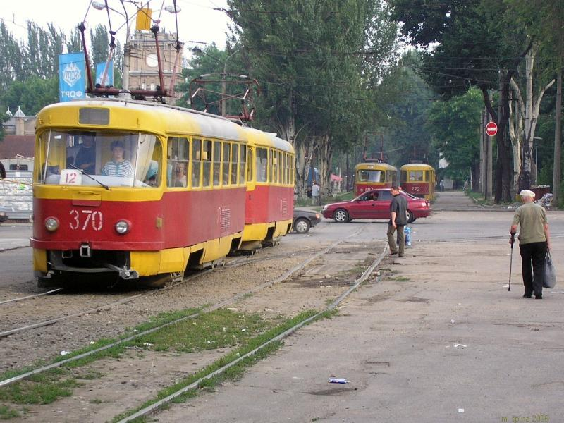 Tramvaje české výroby v Záporoží na Ploščadi Svobody.